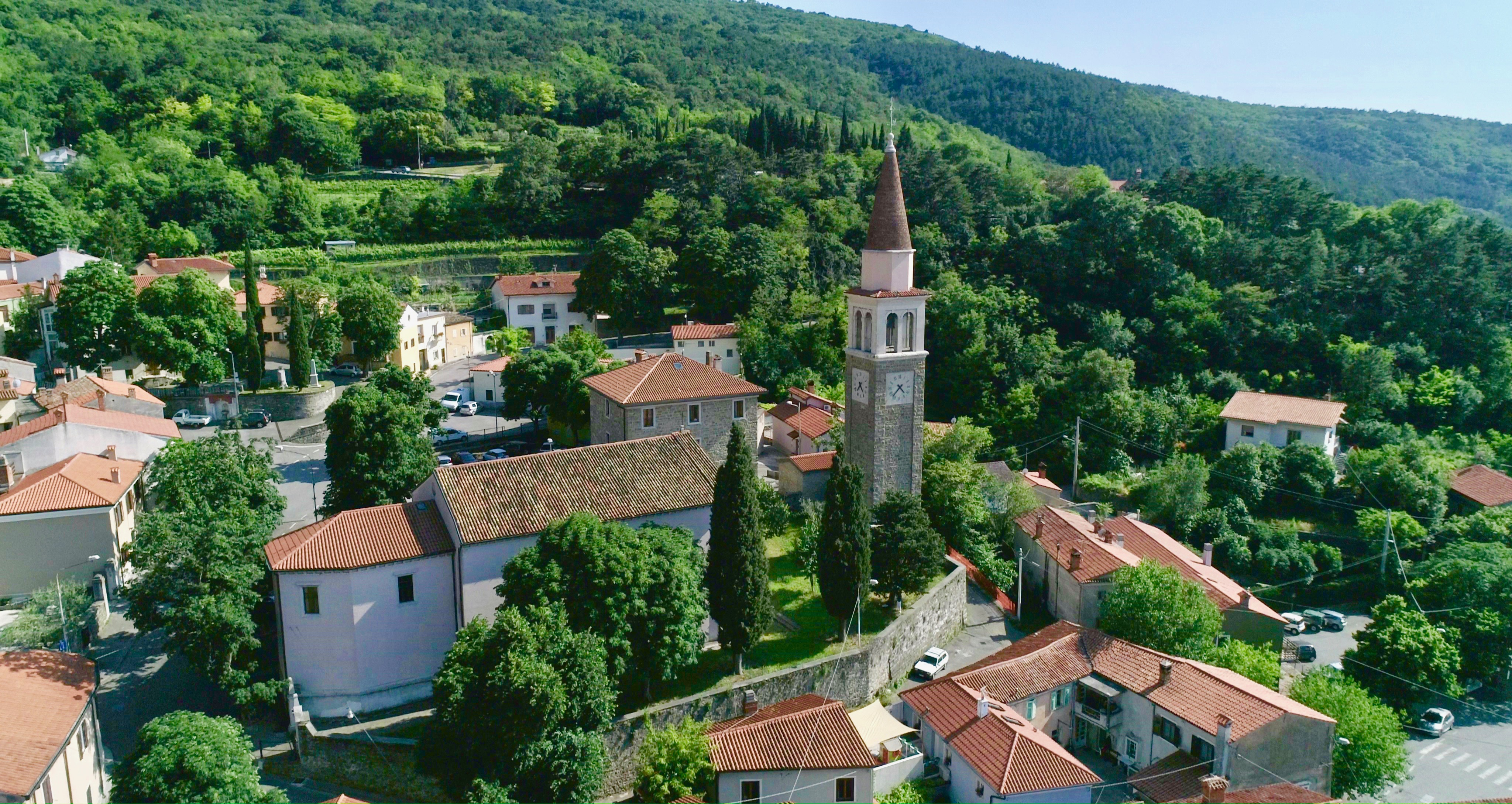 DOLINA-VEDUTA SULLA PIEVE DI SANT'ULDERCIO , COPYRIGHT 2020, Central European Institute "J.Pangerc"